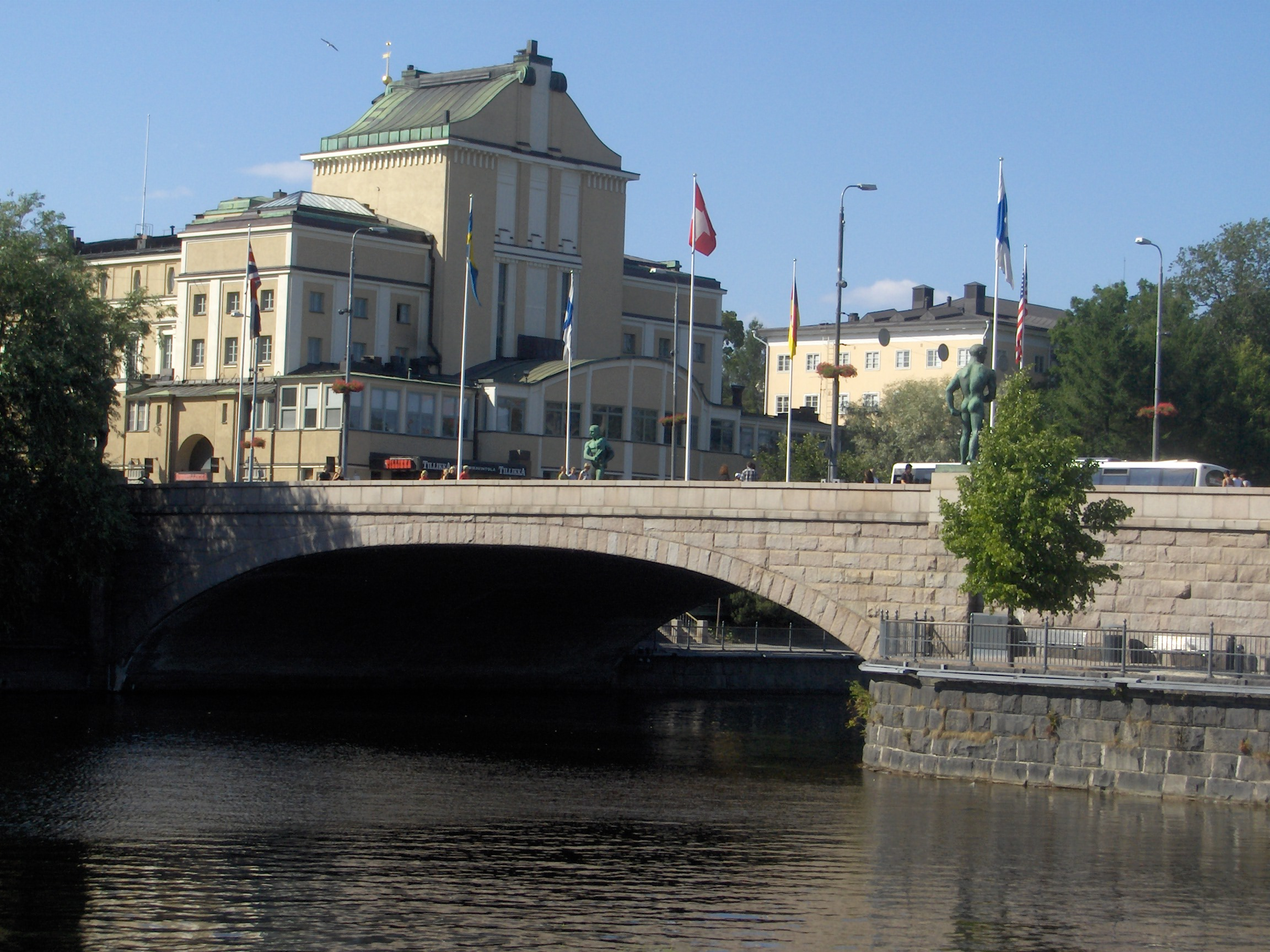 Hämeensilta bridge in Tampere